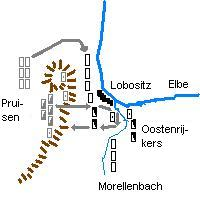 Zelf gemaakt, ooit voor de engelse wiki, nu ook hier.